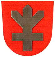 Karinaisten vaakuna